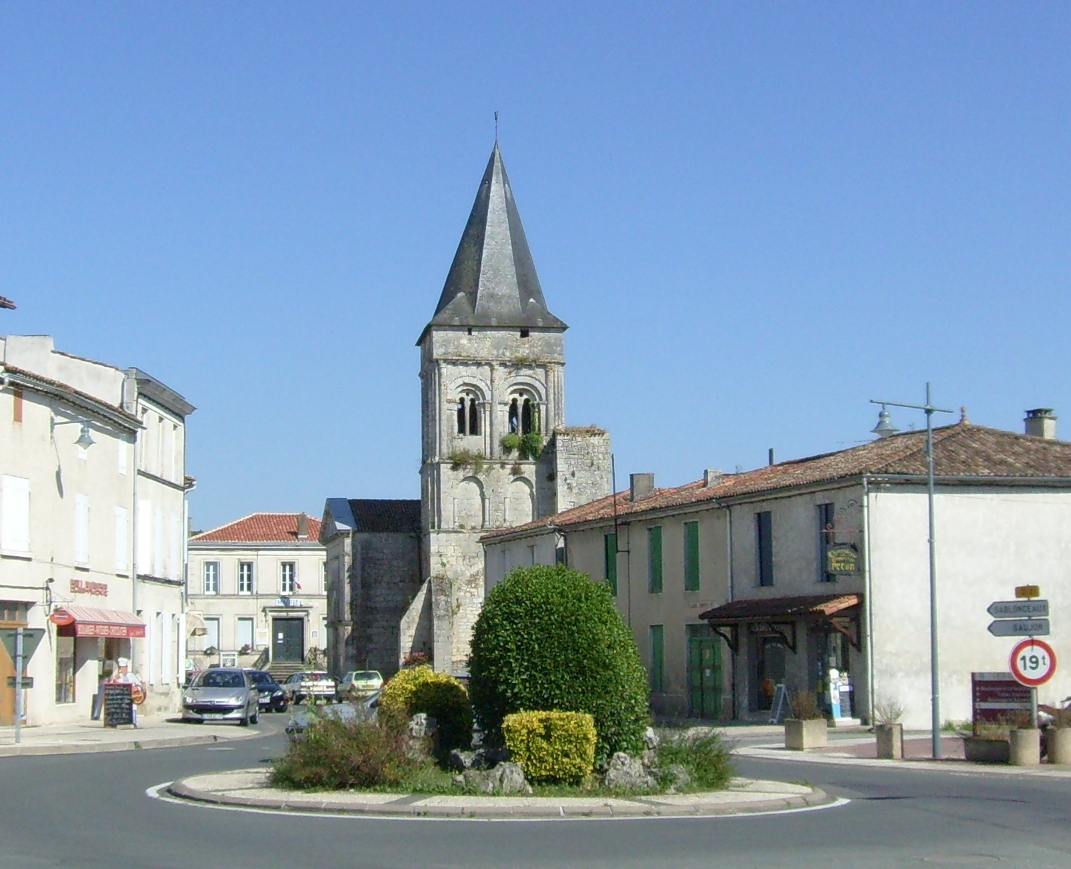 Le centre-bourg du Gua